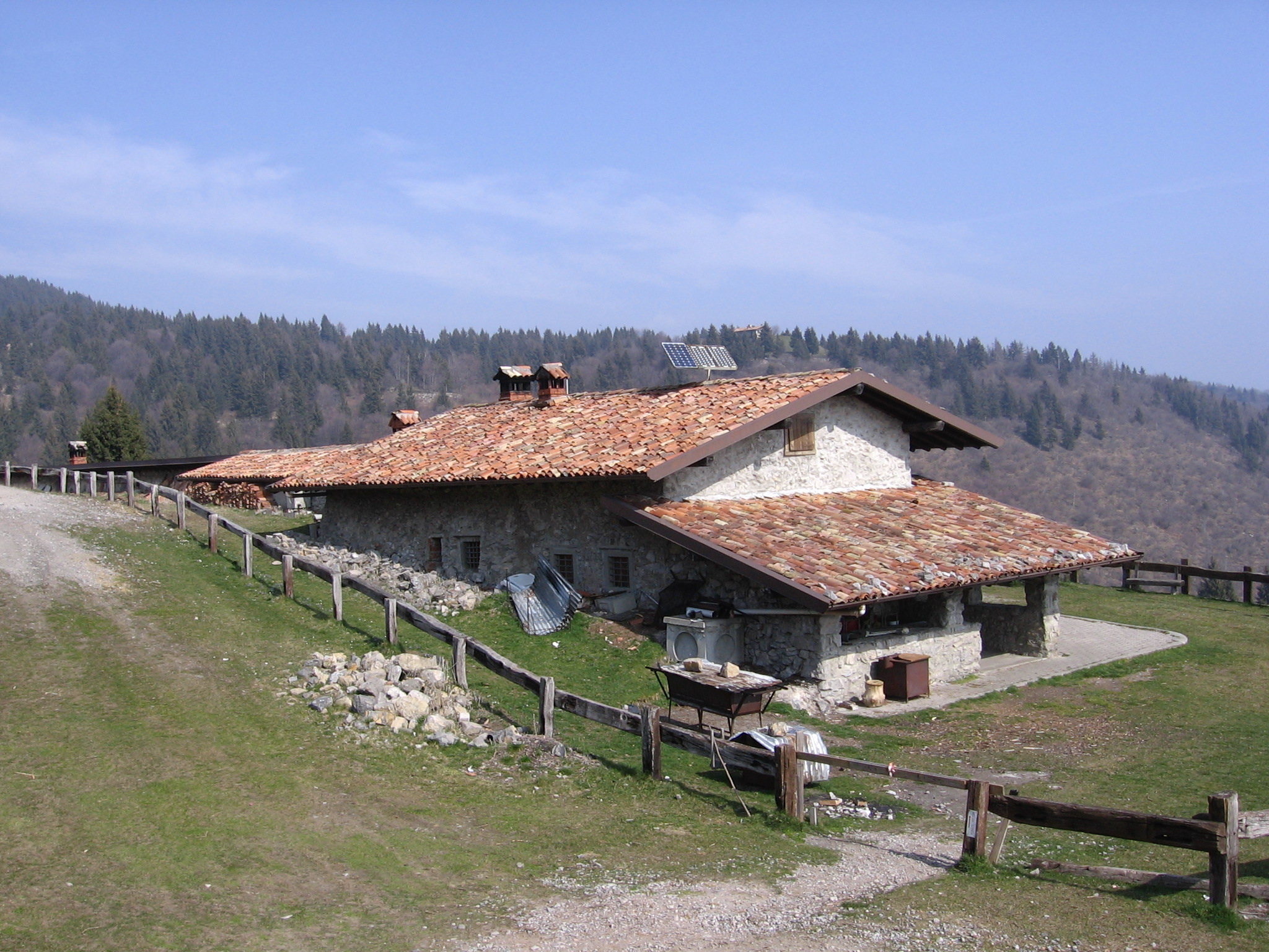 Malga lunga, Bergamo, Italia